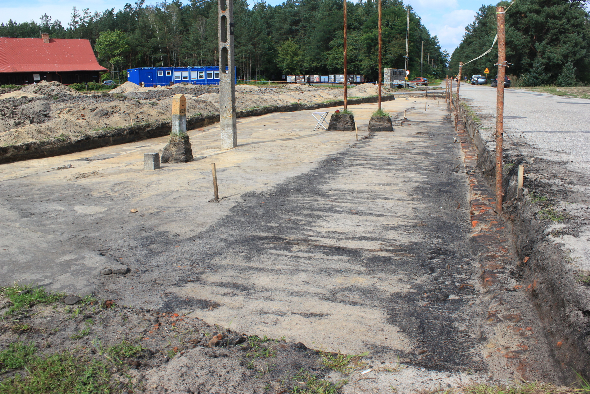 Hornjoserbsce: Wurywanja w něhdyšim koncentraciskim lěhwje Sobibór, Pólska.